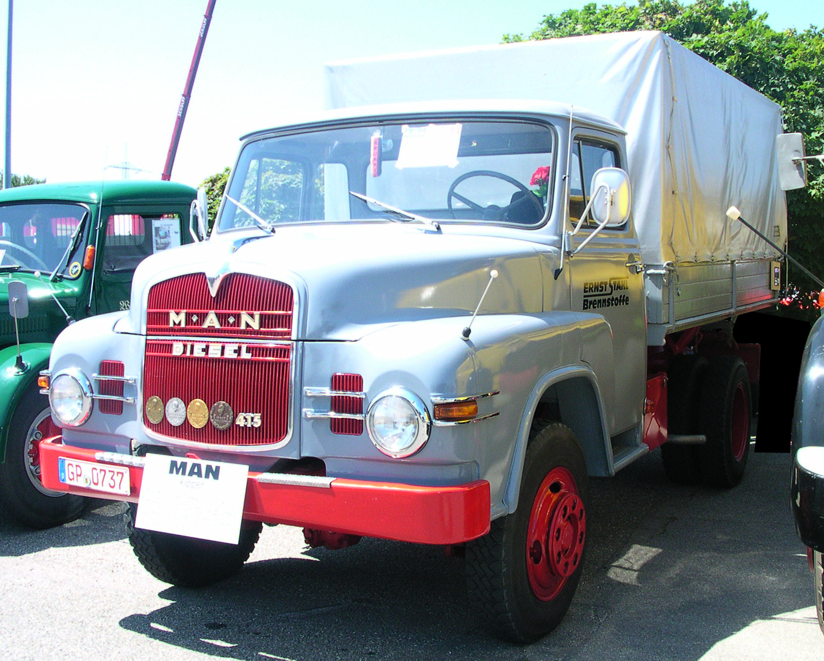 MAN 415 kurzer Kipper mit Plane, Baujahr 1965, 88 kW (120 PS) in Wörth am Rhein beim Oldtimer-Treffen bei Daimler-Chrysler